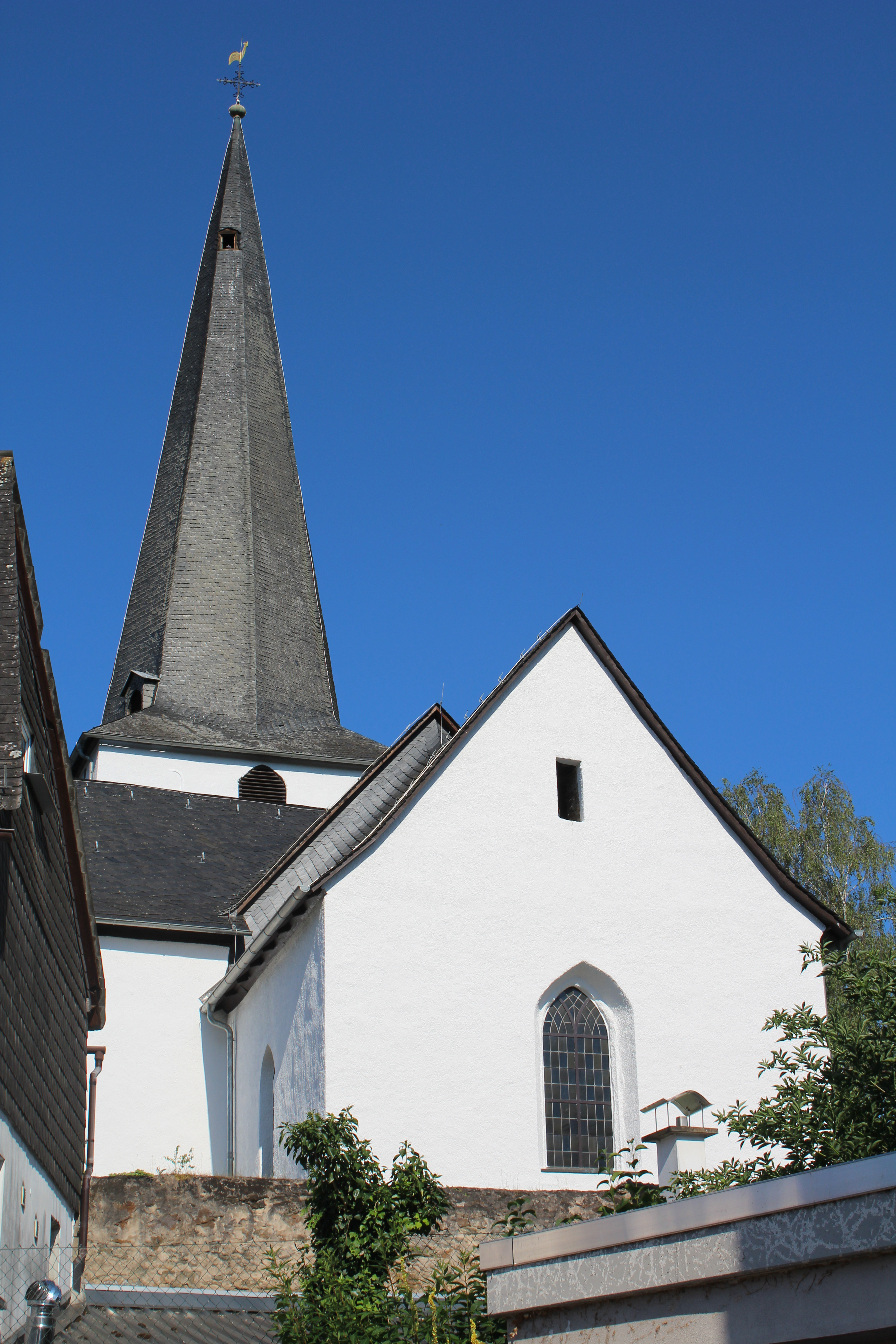 Evangelische Kirche Leun, Lahn-Dill-Kreis, Hessen, Deutschland